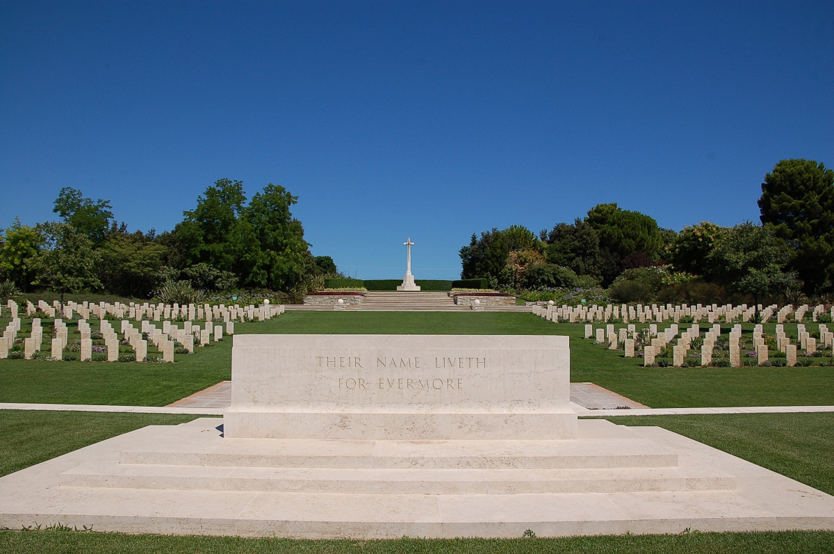 Der englische Soldatenfriedhof Torino am Fluss Sangro bei Ortona